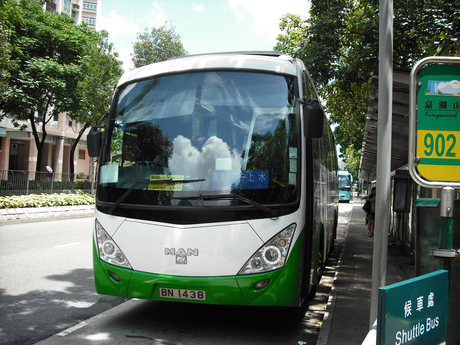 中文（香港）: 嘉湖山莊居民巴士服務巴士，於上水火車站對出。